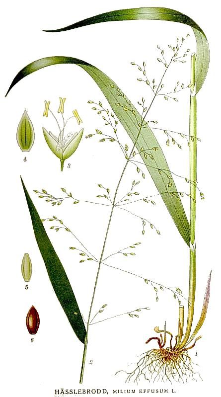 Milium effusum L. Original Description "Hässlebrodd", Milium effusum L.